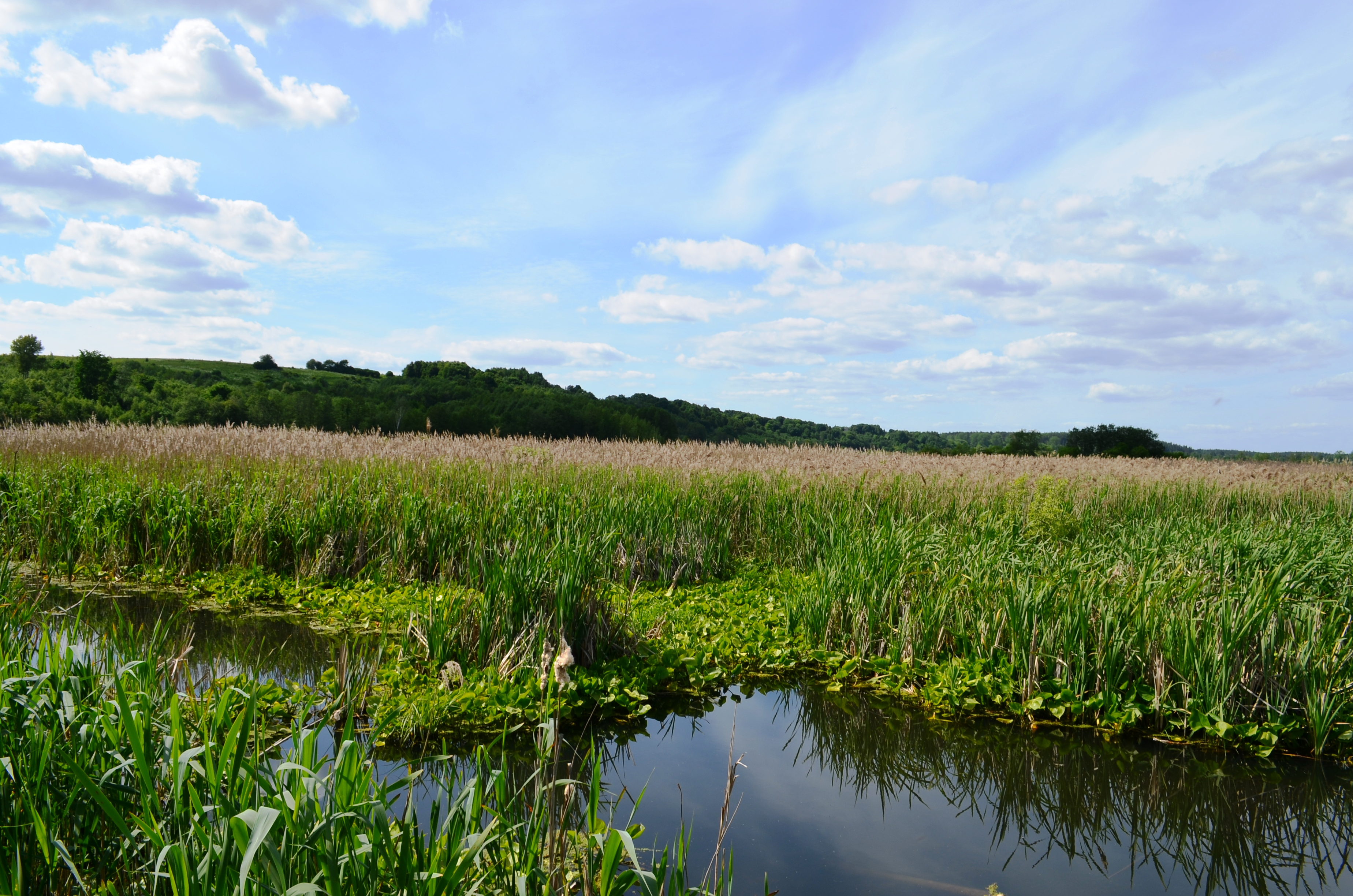 Supelkėjęs Didžiulio ežero pietinis galas, Trakų raj.